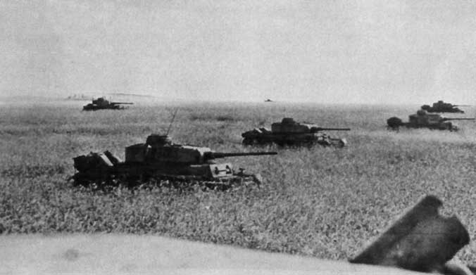 Carri armati Panzer III e Panzer IV pronti alla battaglia nell'estate 1943